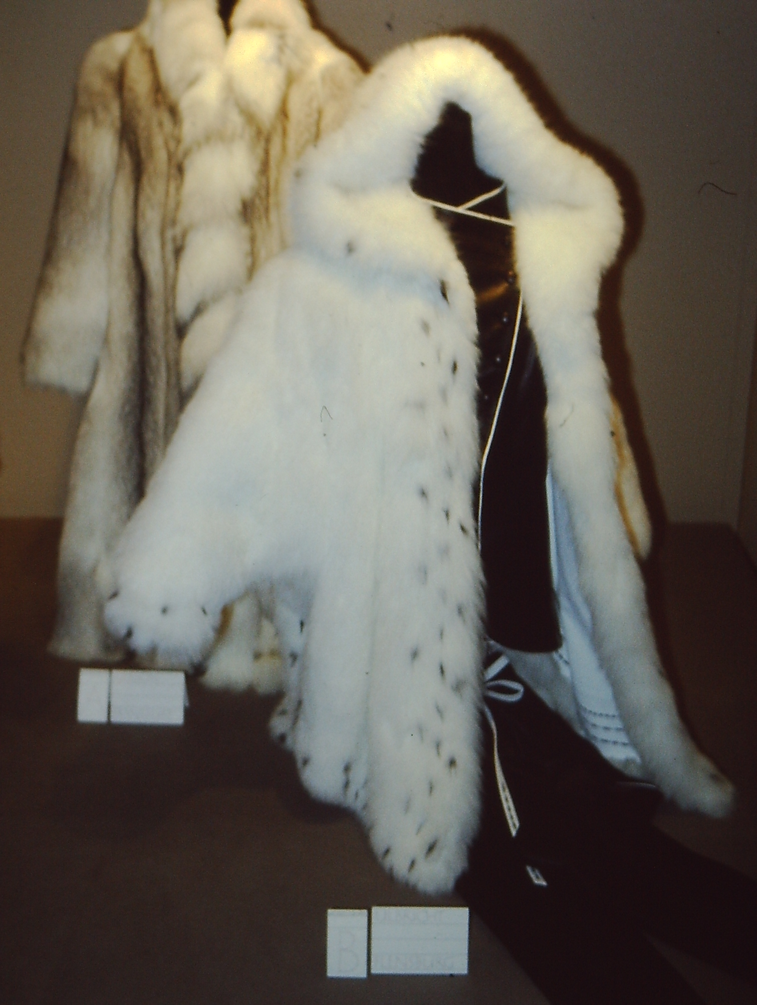 Leistungswettbewerb des Kürschnerhandwerks, Leistungsschau 1982, anlässlich der Pelzmesse in Frankfurt am Main. Shadowfuchsjacke. Firma Ulbricht, Flensburg.